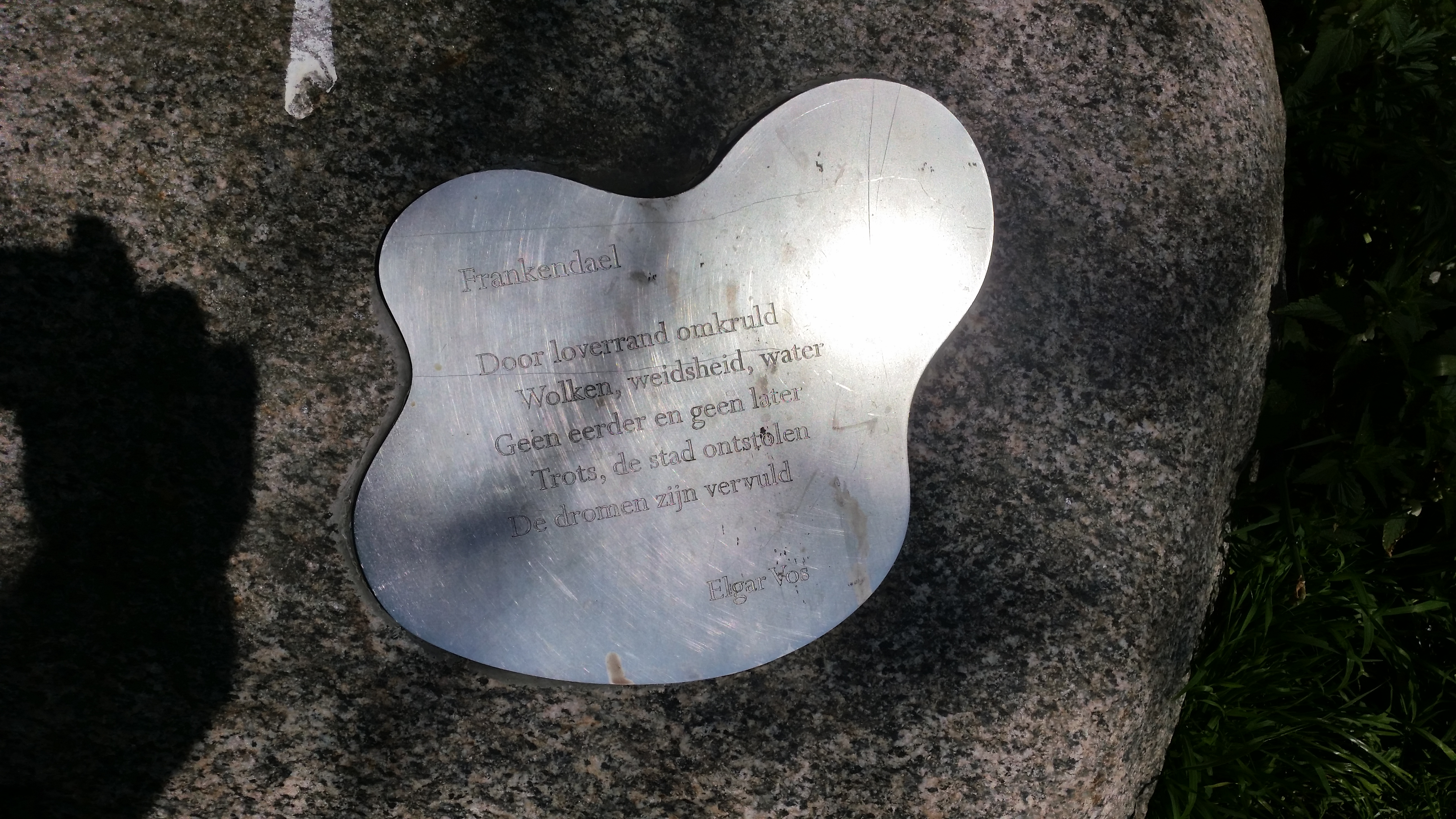 Gedicht Frankendael van Elgar Vos op plaquette op een staan tussen Middenweg en Park Frankendael, Watergraafsmeer.